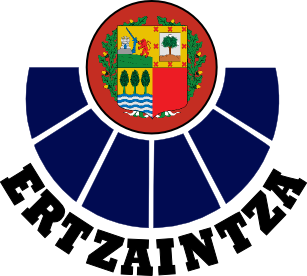 Logo de la Policía del País Vasco (Ertzaintza)